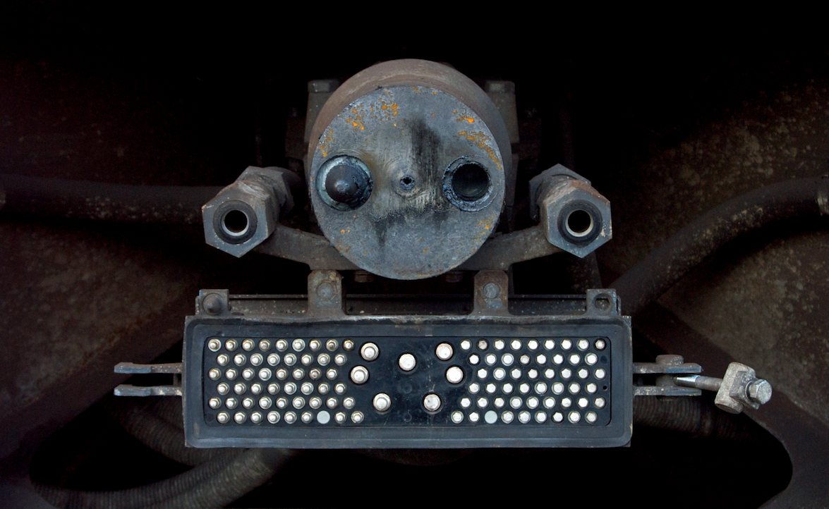 dispositivo de ligação (engate rígido) do veículo Motora-piloto 1 da UQE 2323. Local: Entroncamento (EMEF-GOE) [Linha do Norte, PK 106] Data e hora: 1 de Novembro de 2008 [17h05] Material: Automotora 2323 [Unidade Quádrupla Eléctrica]